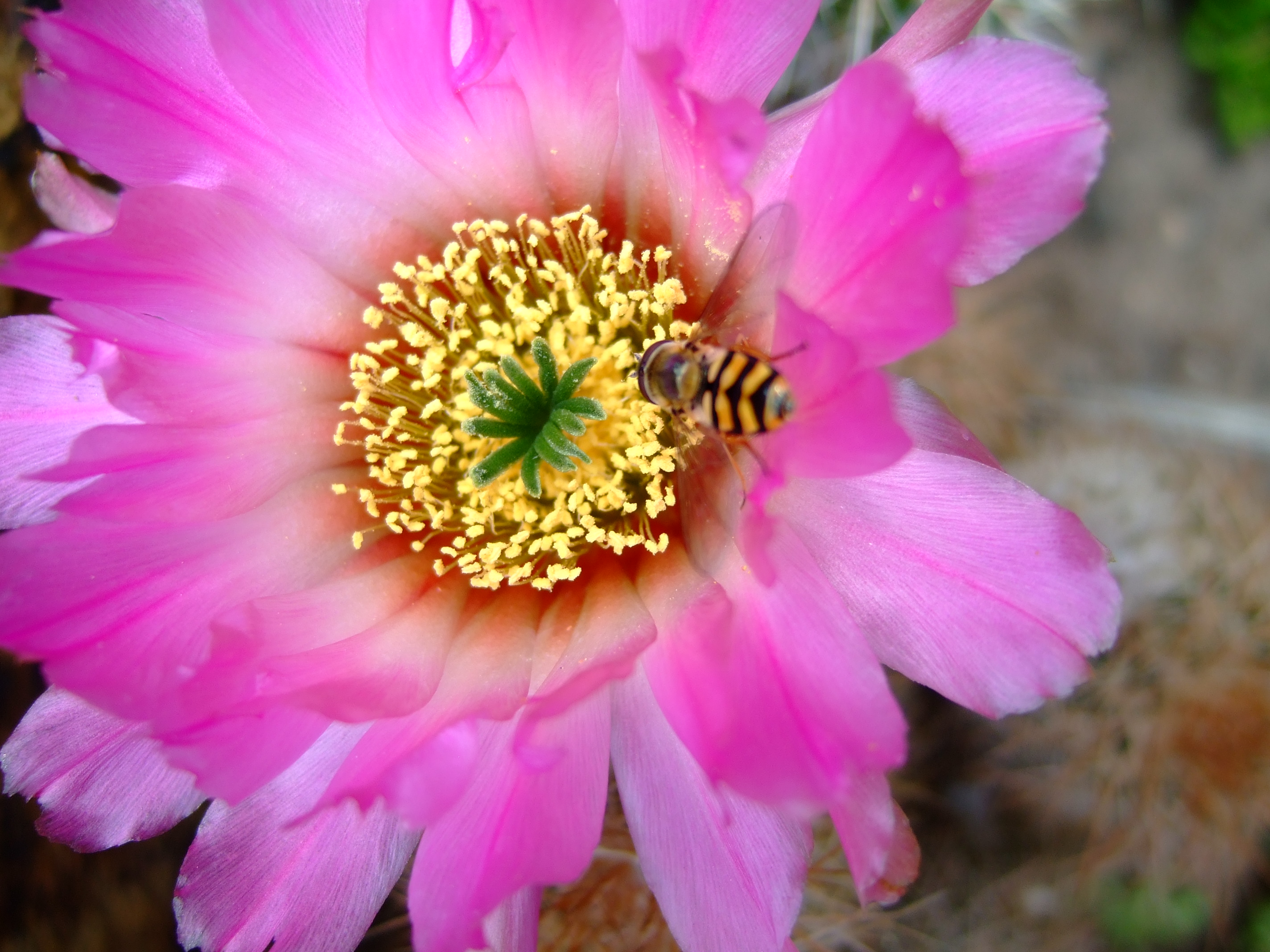 Echinocereus reichenbachii ssp. baleyi (File name misspelled!)